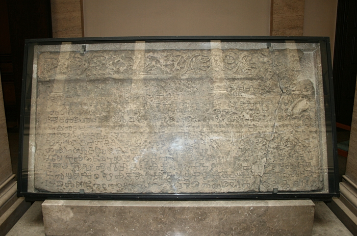 Baščanska ploča u auli Hrvatske akademije znanosti i umjetnosti u Zagrebu